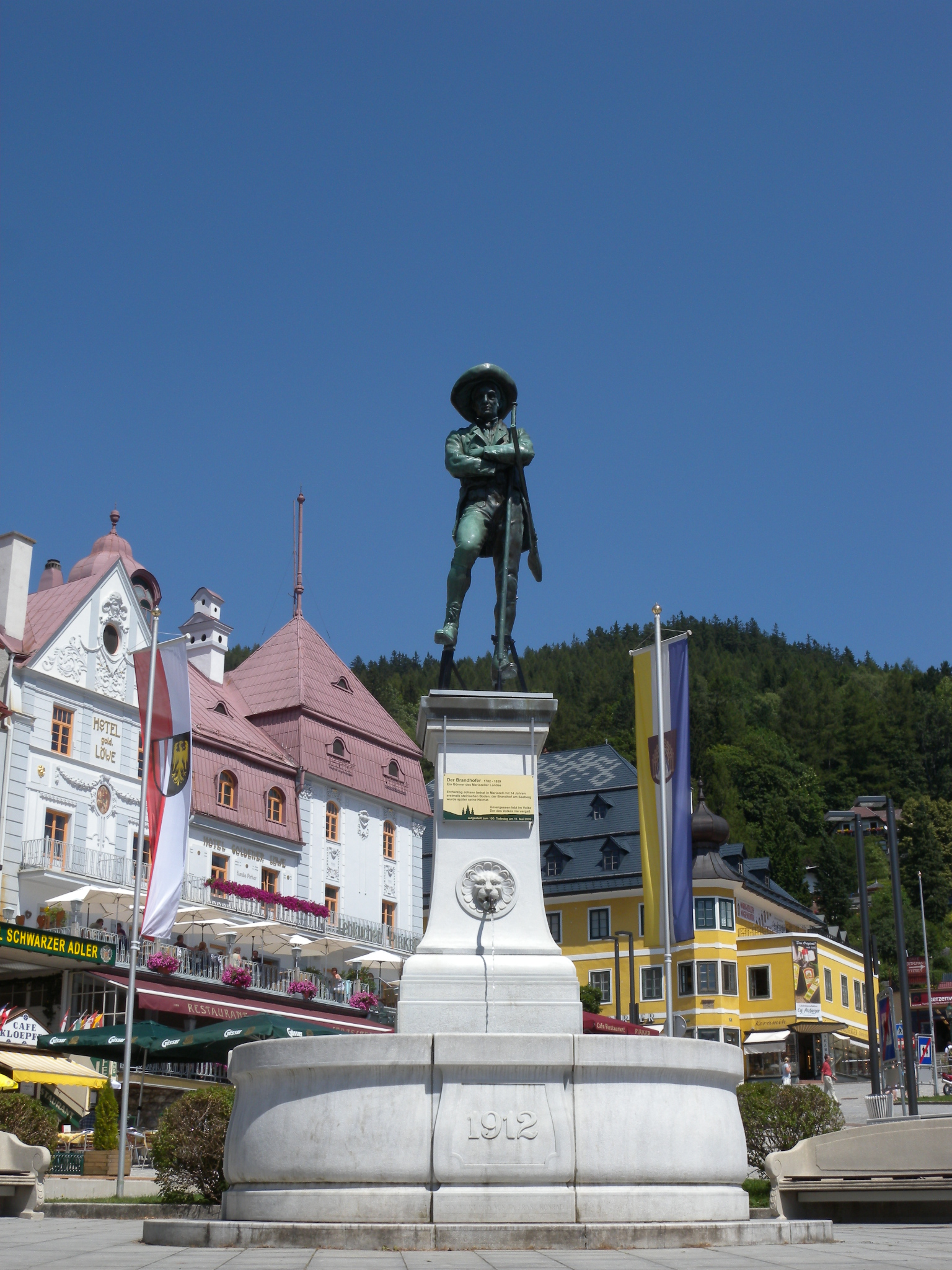 Erzherzog Johann: Der Brandhofer - Ein Gönner des Mariazeller Landes. Brunnen in Mariazell, Statue errichtet 2009